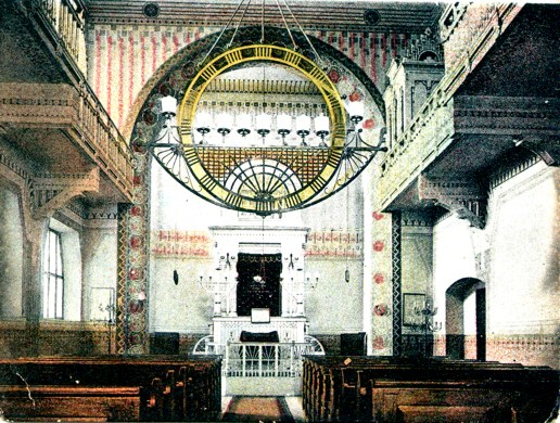 Hradec Králové Synagogue - interior